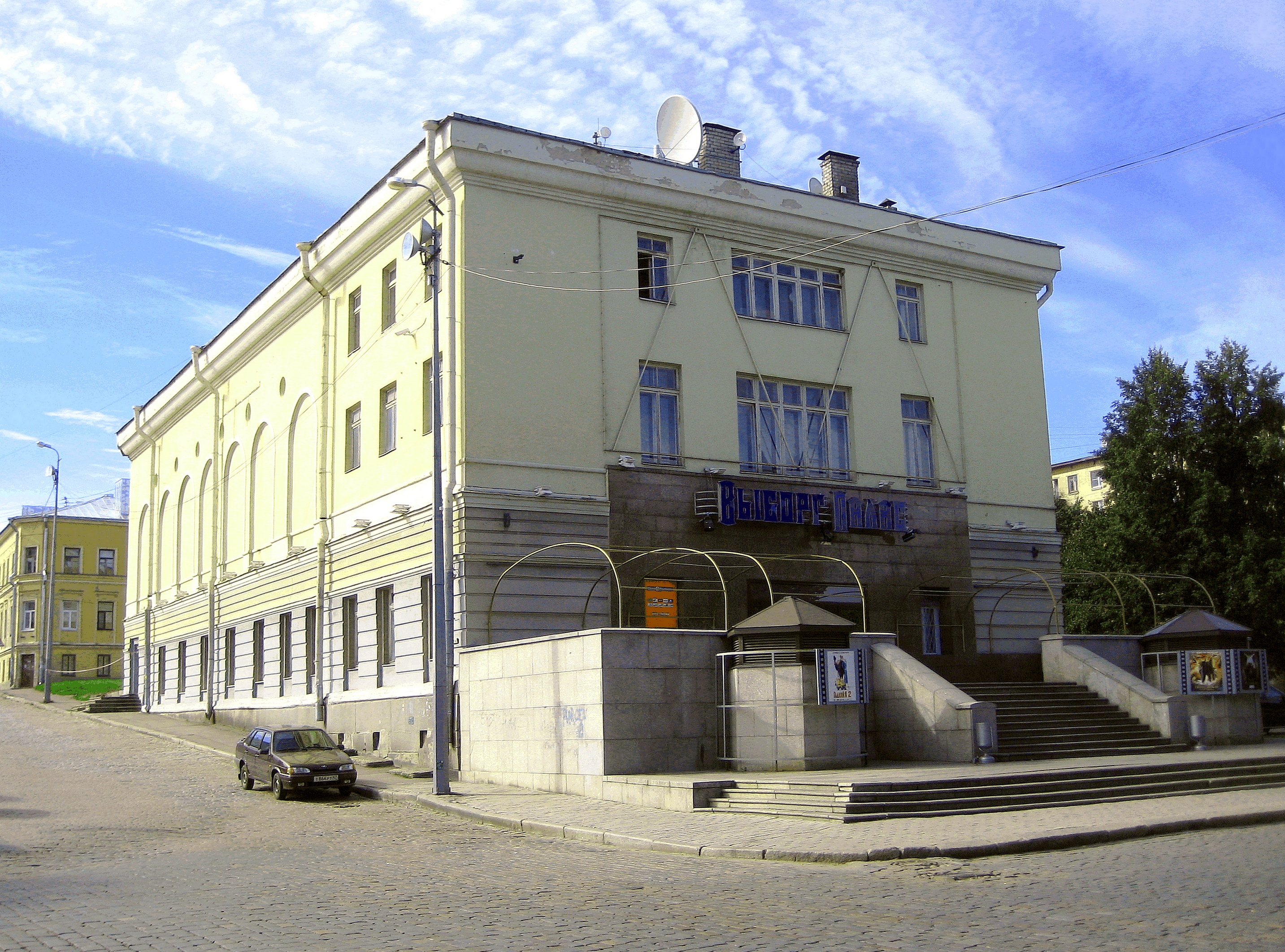 Выборг. Кинотеатр Выборг-Палас.